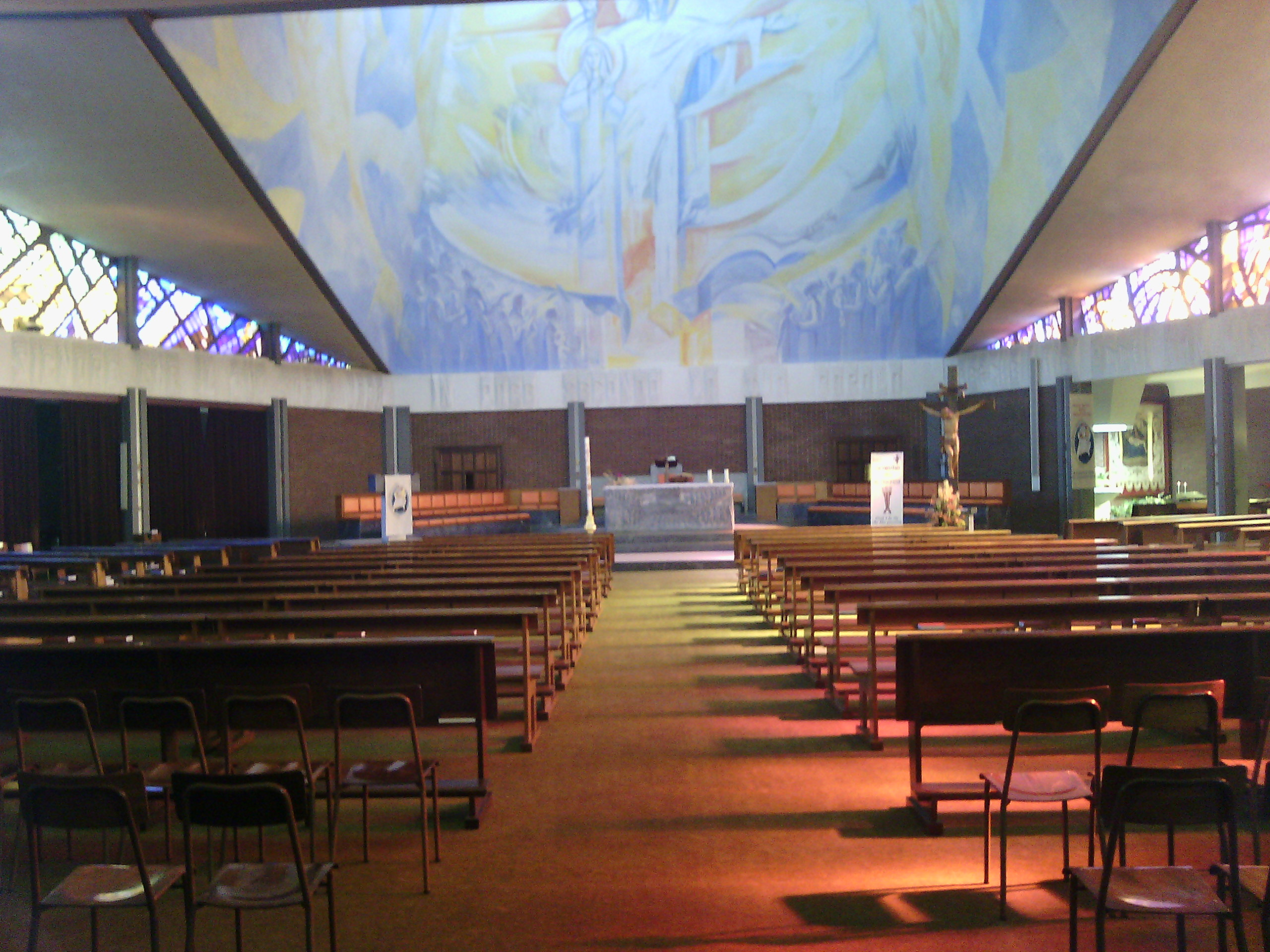 Interno della chiesa parrocchiale di Mesero (MI) - Italia